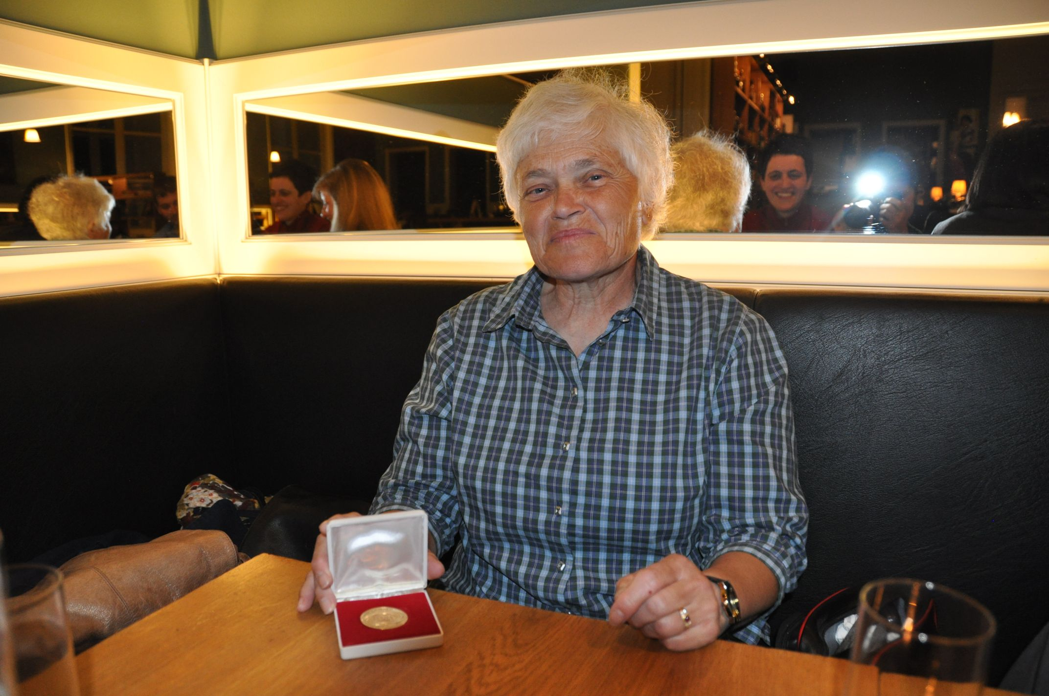 Bärbel Wohlleben (Torschützin des ersten weiblichen Tors des Monats, Trainerin) Foto: Nicola Egelhof